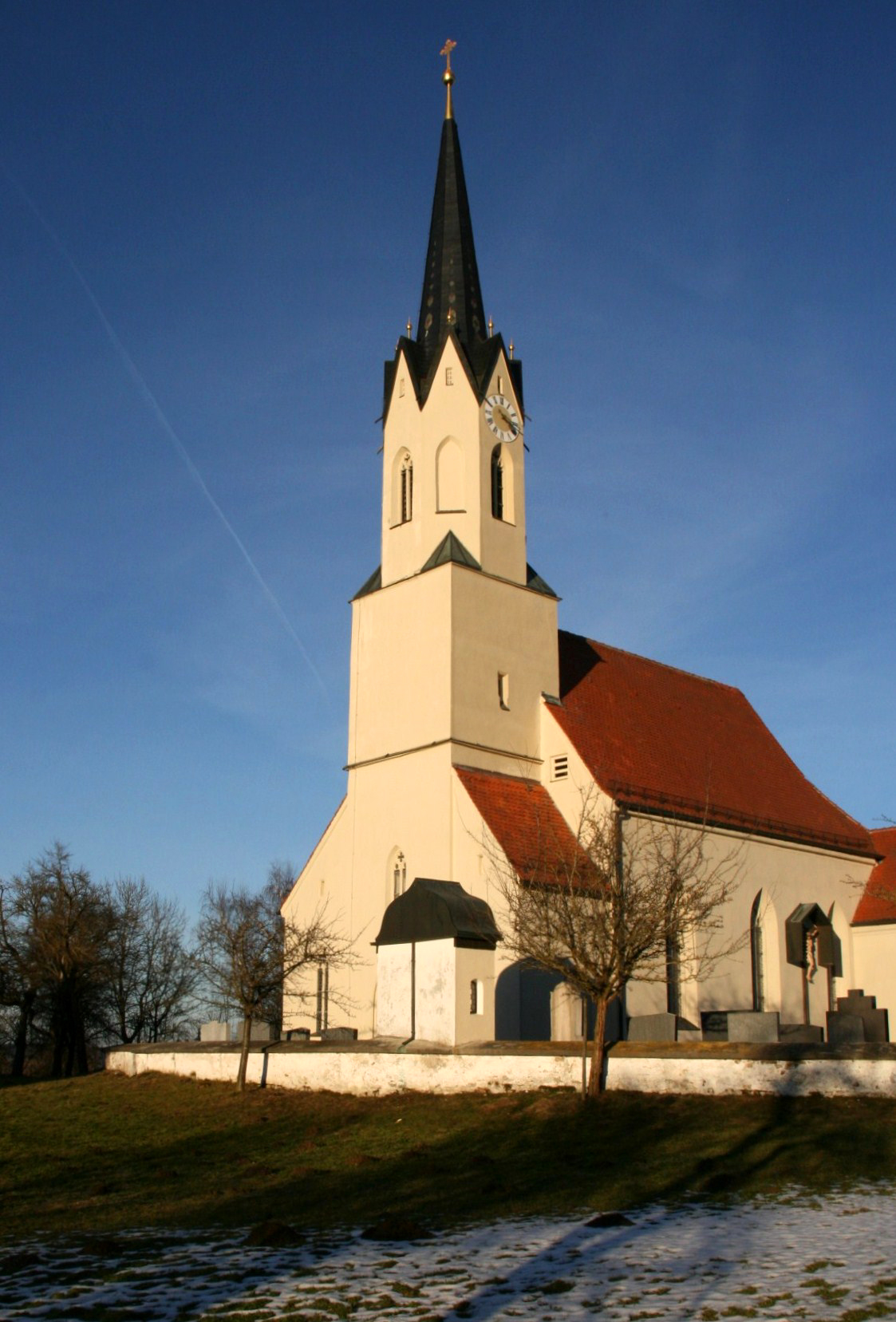 Die katholische Kirche St. Rupert in Gumattenkirchen (Gemeinde Mettenheim, Landkreis Mühldorf am Inn, Oberbayern). Das Gotteshaus wurde im 15. Jahrhundert gotisch errichtet, 1770 barockisiert, 1878 regotisiert.